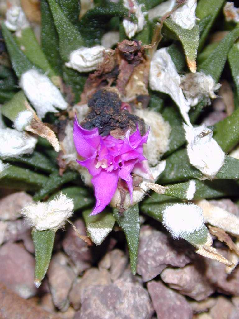 ariocarpus agavoides